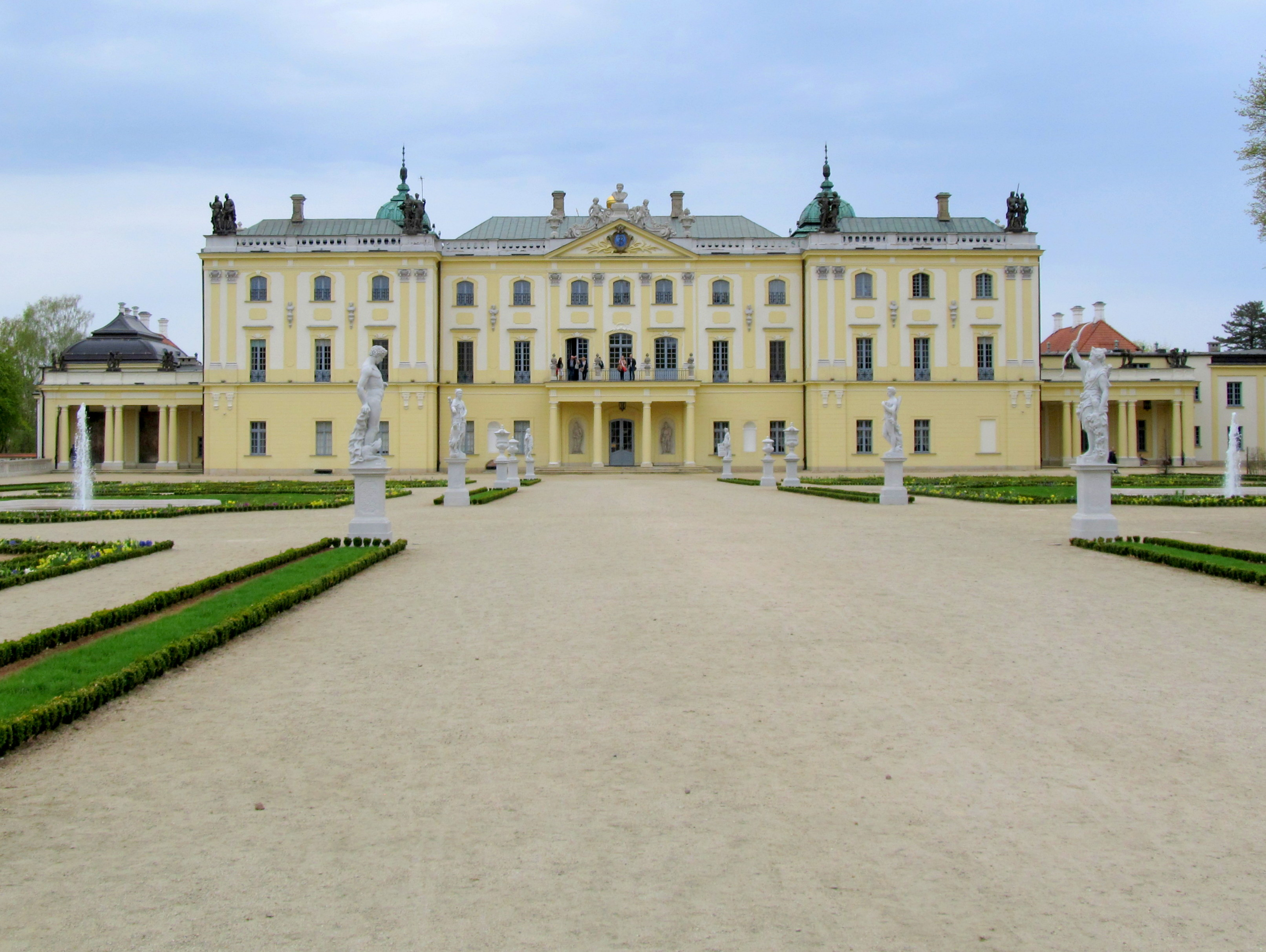 Białystok, zespół pałacowy Branickich